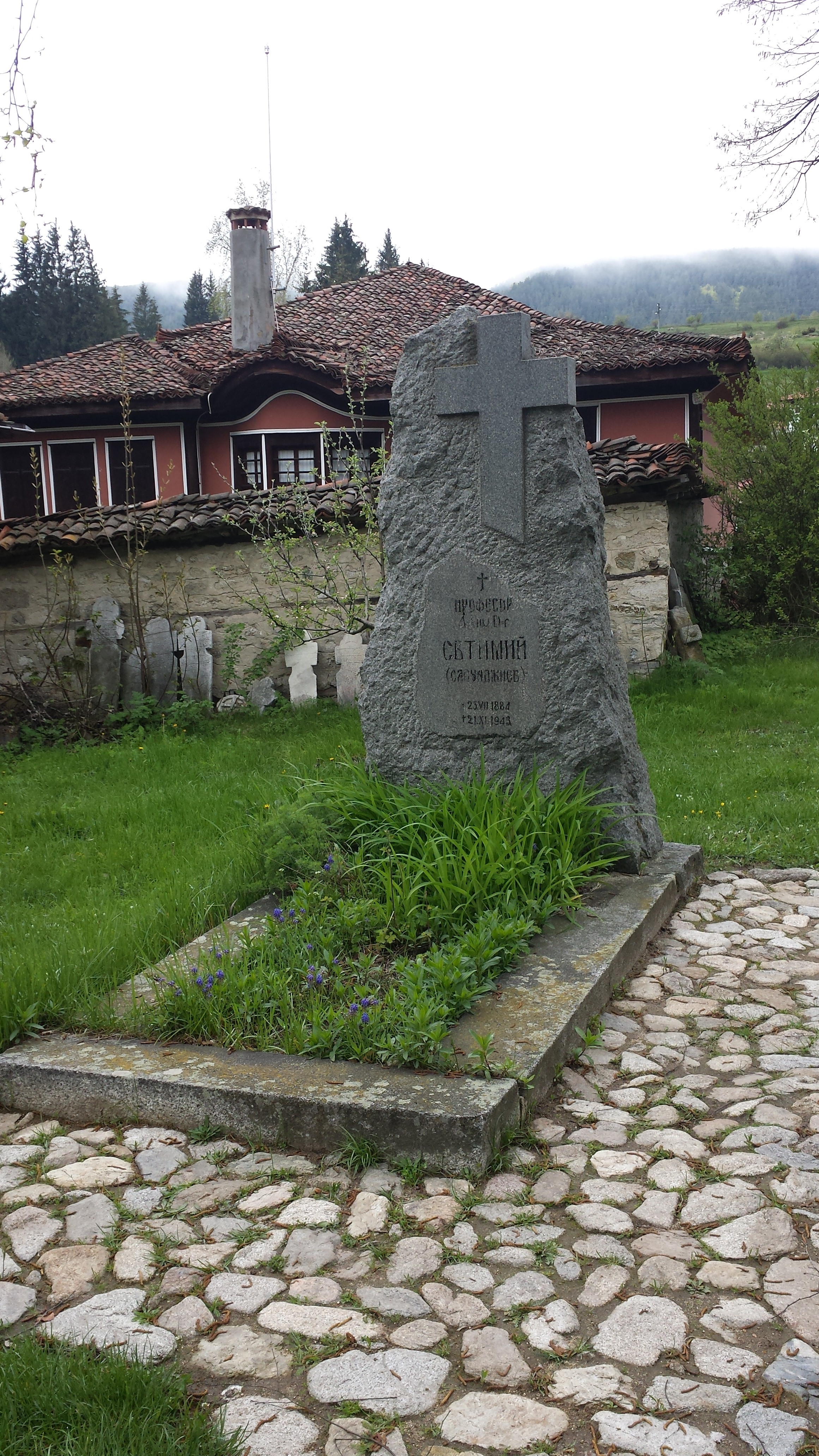 Надгробният паметник на Евтимий Сапунджиев